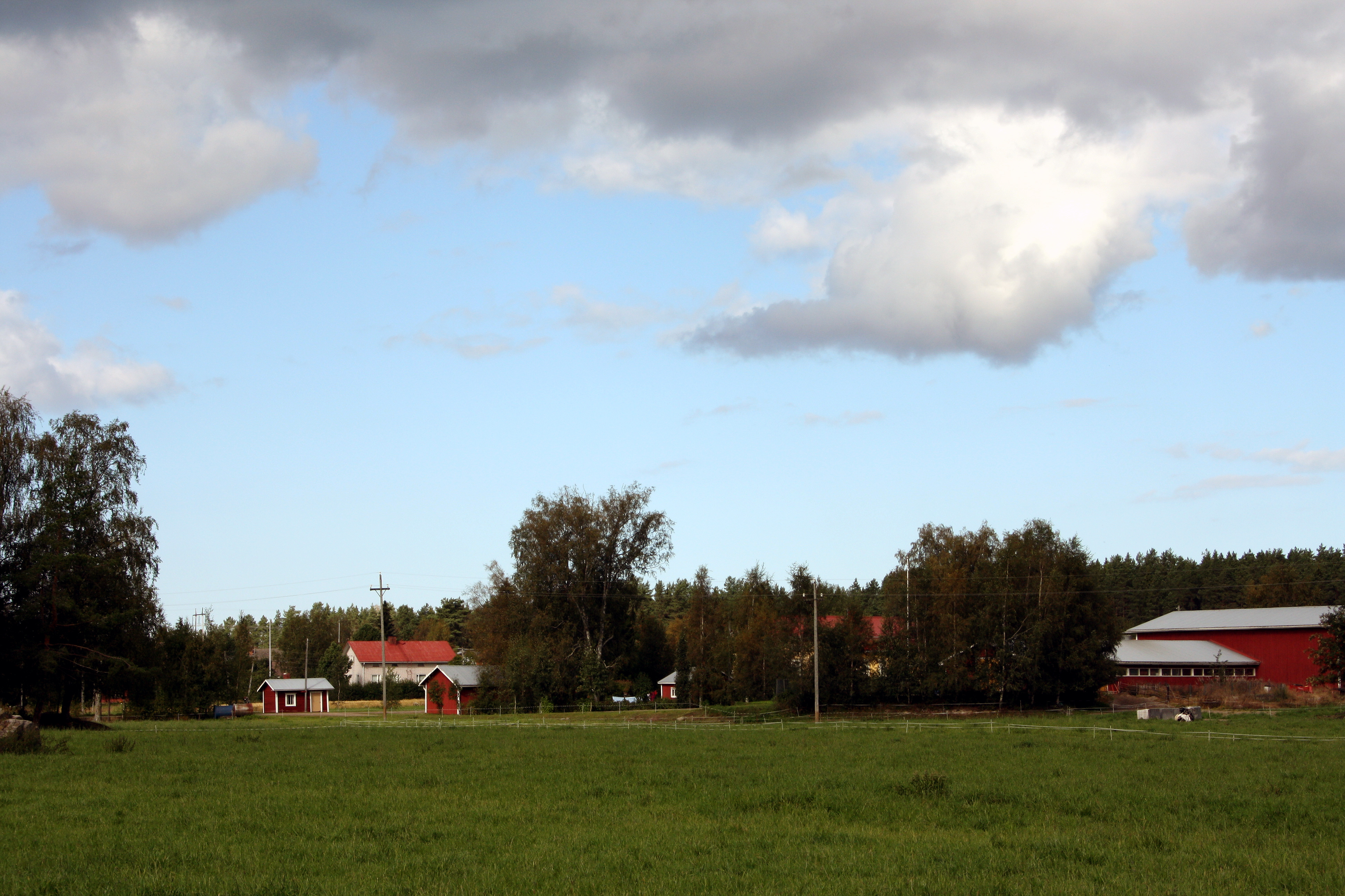 Peltokorven kylää Kokkolan Kälviällä, Suomessa.